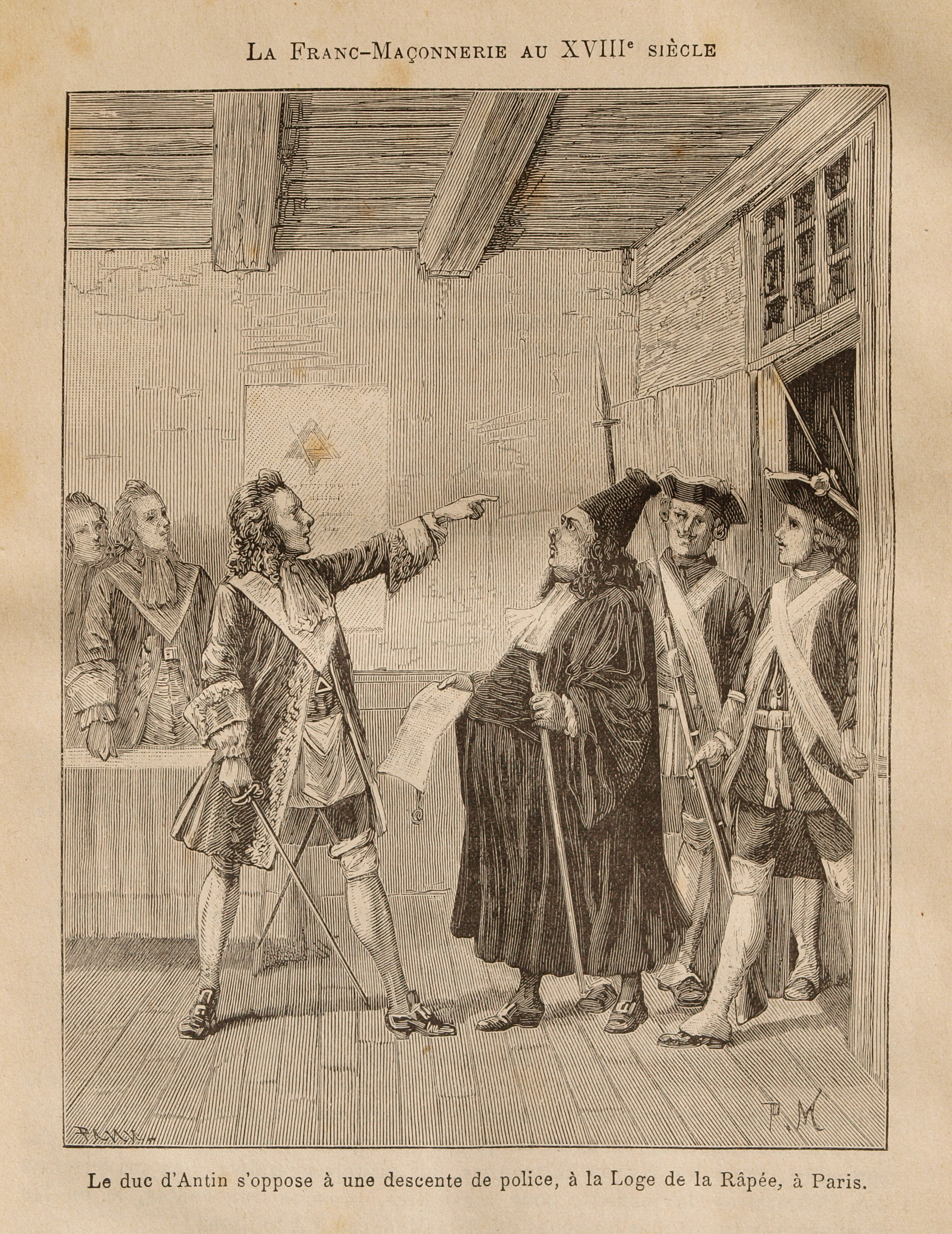 Une des gravures du document de Léo Taxil, Les Mystères de la Franc-Maçonnerie, Paris, 1886.